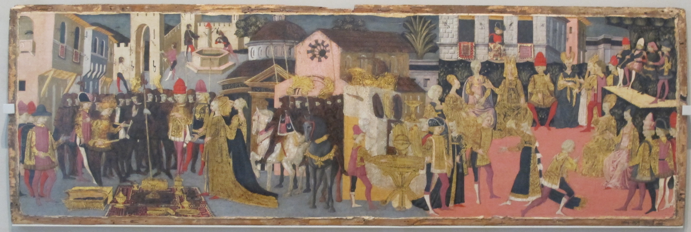 Apollonio di giovanni, fronte di cassone con scena della contingenza di scipione, 1463-65 ca.